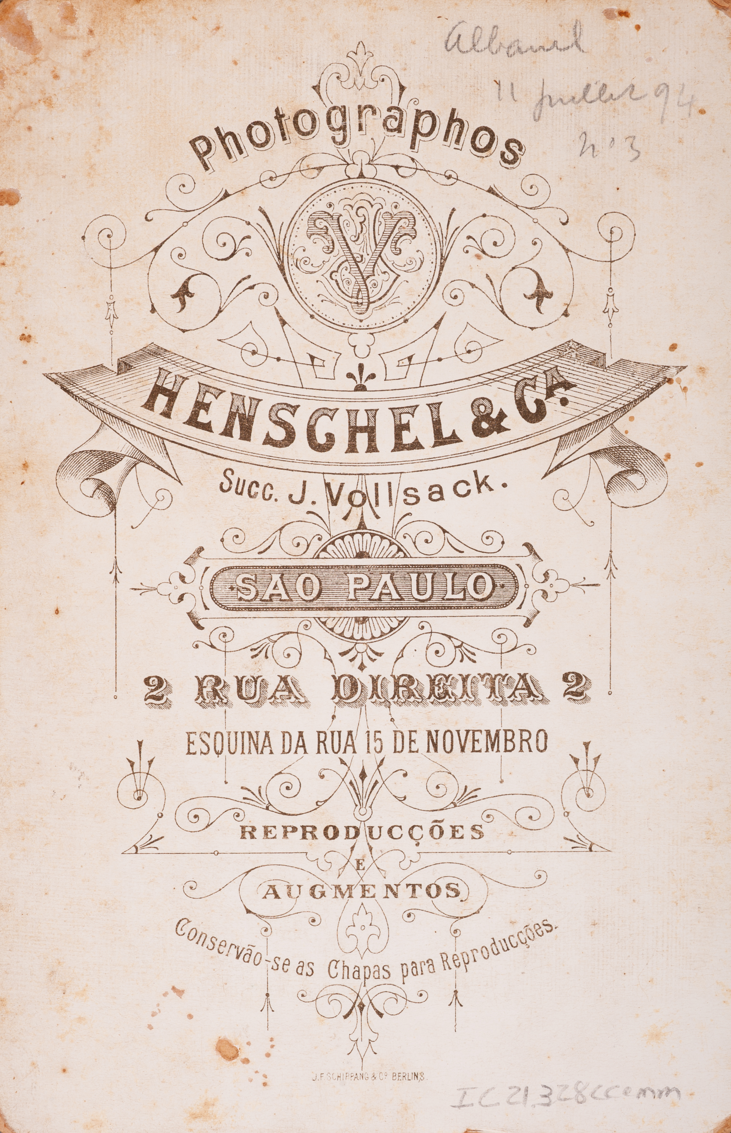 Obra que integra o acervo do Museu Paulista da USP. Coleção Carlos Eugênio Marcondes de Moura. Reg. Agente: Henschell - Photographos & Cia. Sucursal De José Vollsack. Rua Direita, 2, São Paulo.